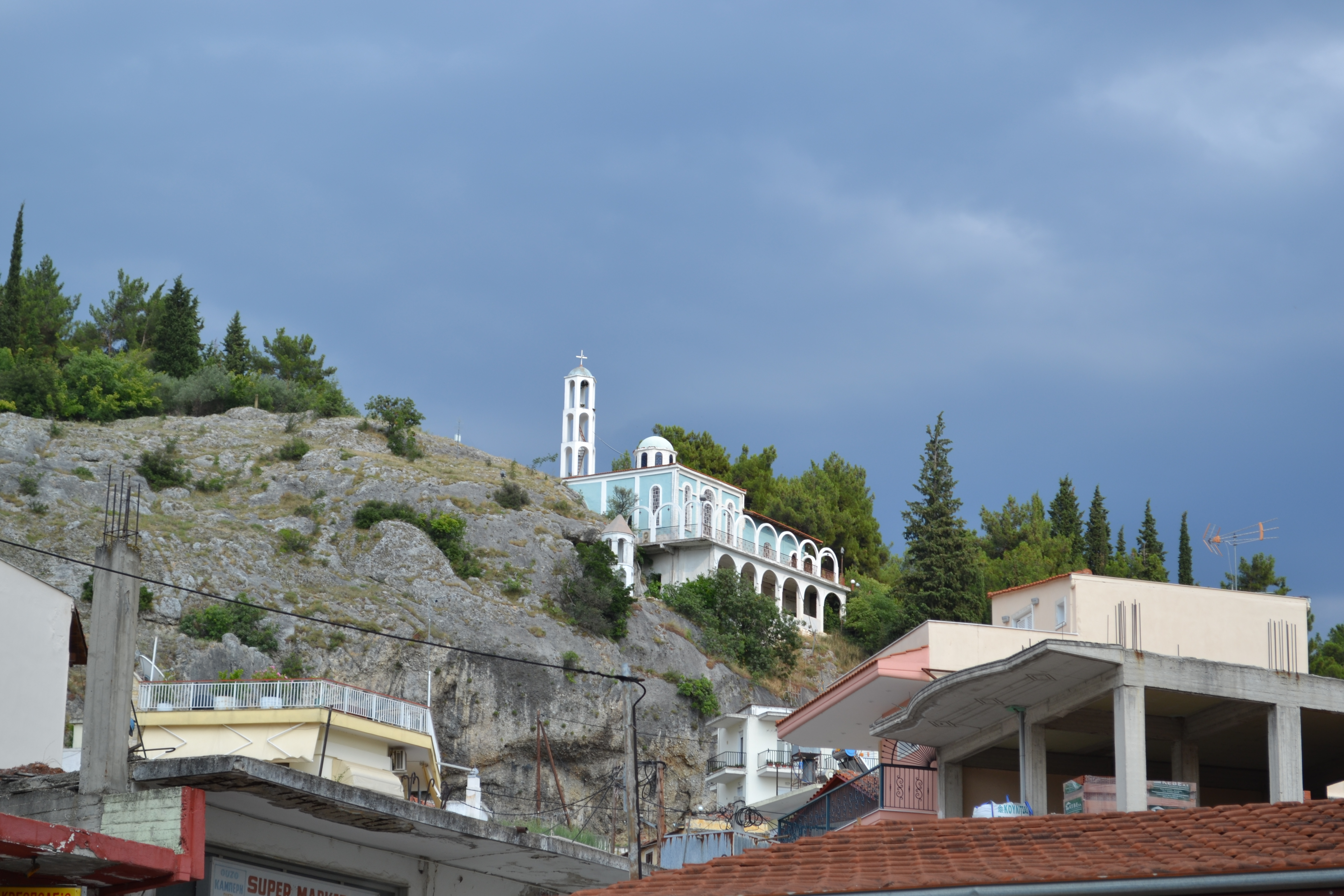 Agios Dimitrios